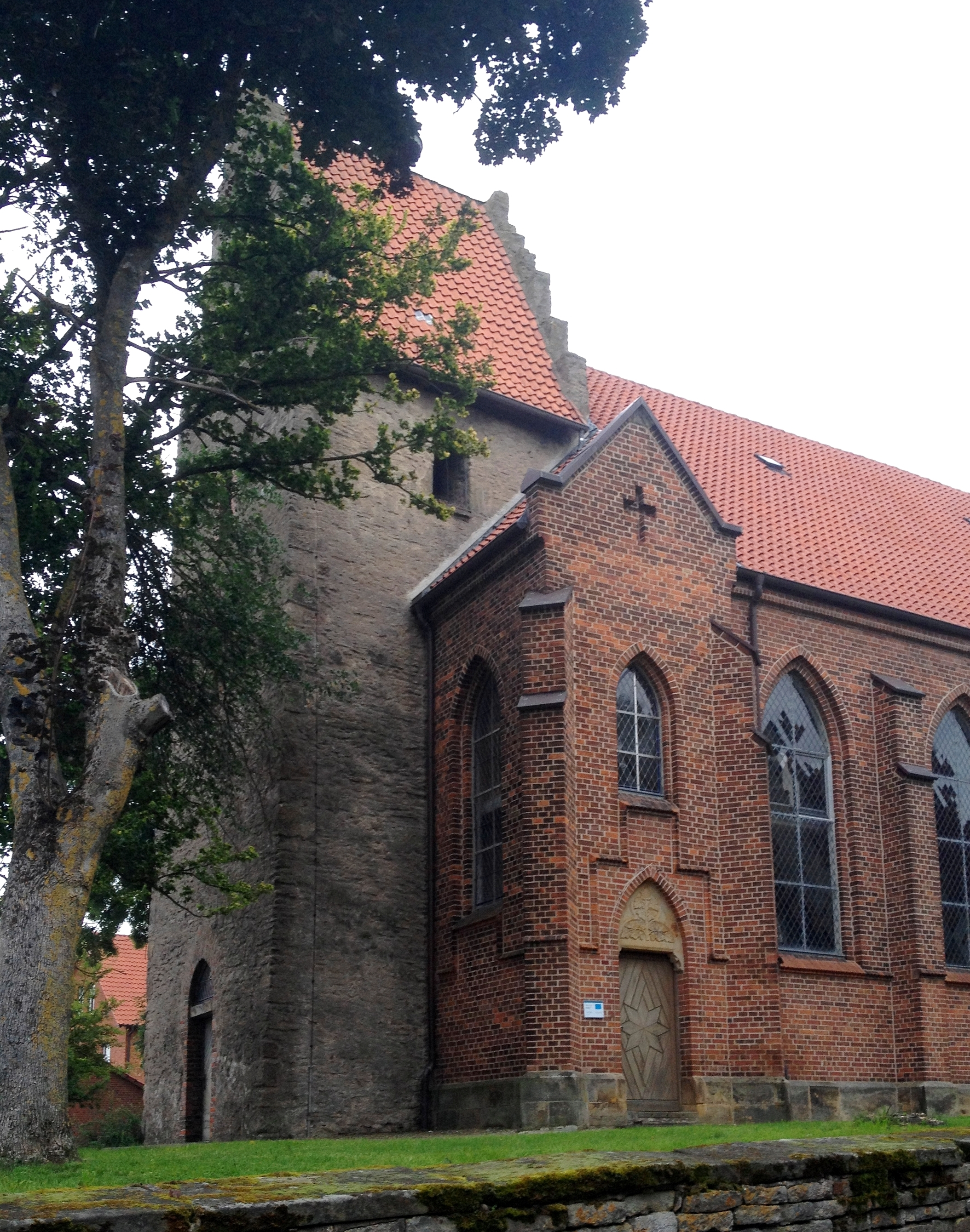 Nettelrede, St. Dionysius, Südwestseite